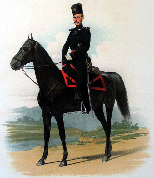 Обер-Офицер Малороссийских Конных Казачьих полков. (В парадной форме). 26 Июля 1855.